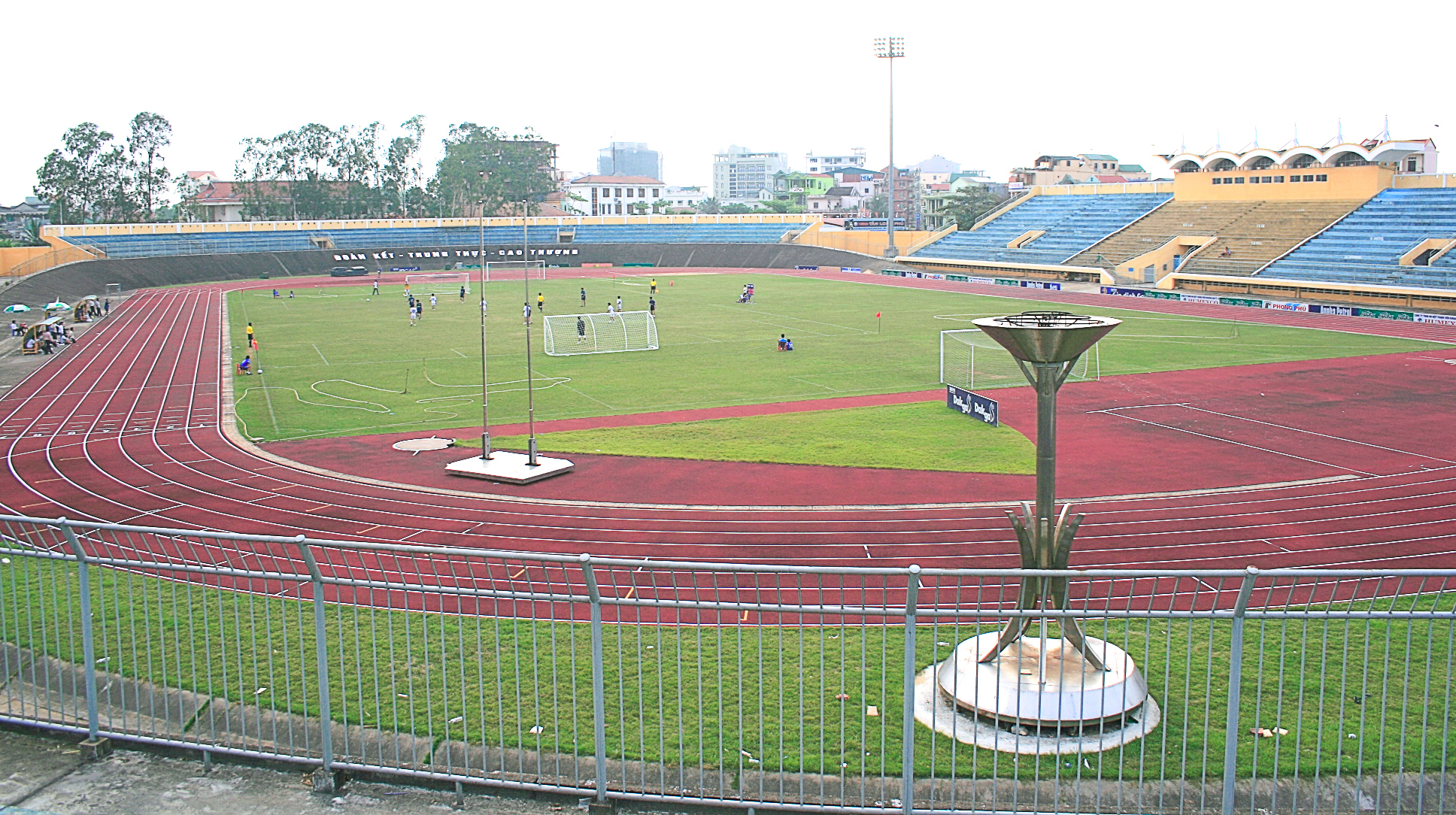 Sân vận động Tự Do, Huế